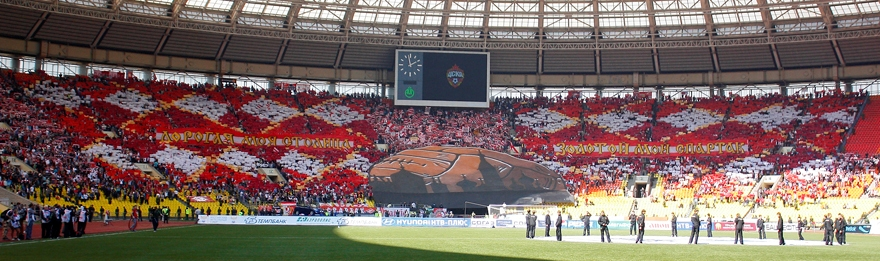 Перфоманс "Дорогая моя столица, золотой мой "Спартак" Москва" на матче с ЦСКА. 2011 год